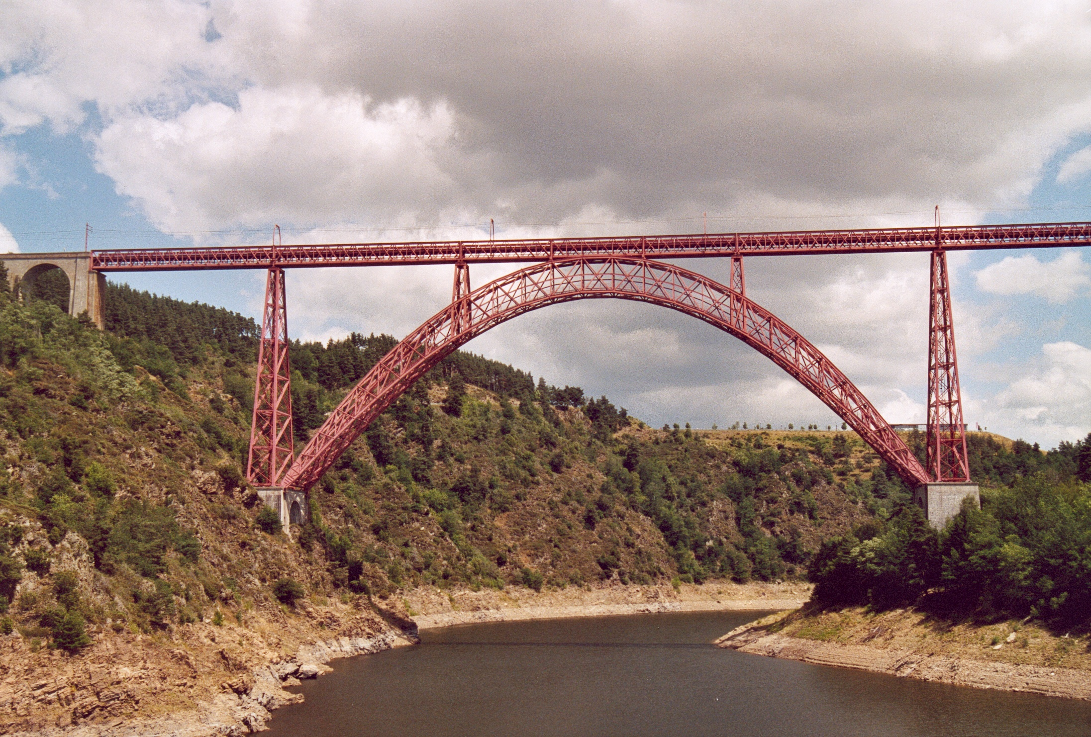 France Cantal Viaduc de Garabit Photographie prise par GIRAUD Patrick